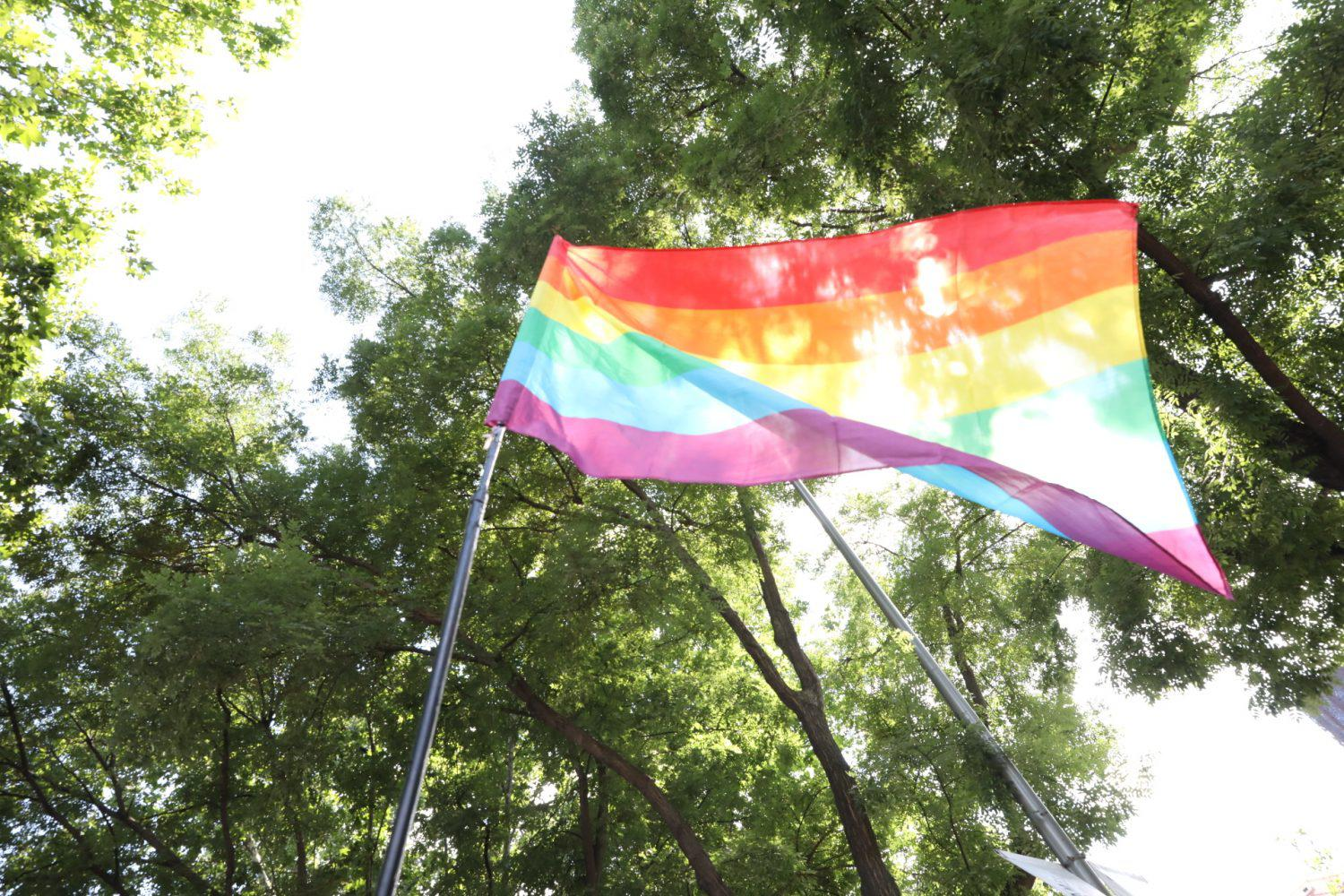 La manifestación del Orgullo ha cumplido este año 40 años de reivindicaciones y lucha; cuarenta años en los que se ha avanzado en la equiparación de derechos, pero aún queda mucho por conseguir sobre todo en el reconocimiento legal a la autodeterminación de género de las personas transexuales. Eran las 17.30 horas cuando bajo el lema ‘Conquistando Igualdad, TRANSformando la sociedad’, arrancaba desde Atocha la manifestación que ha recorrido el eje Prado-Recoletos.